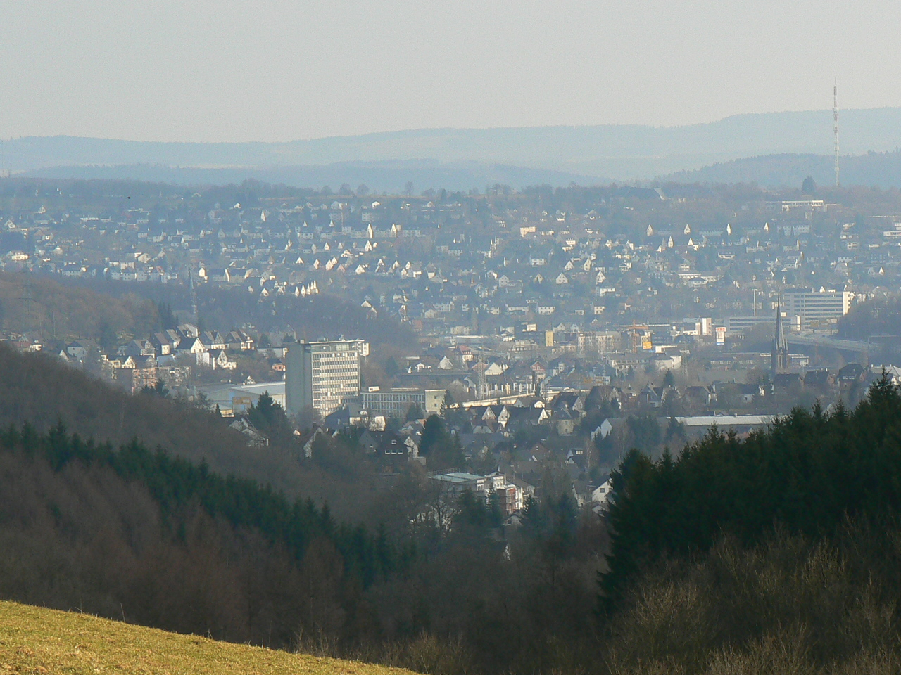 Siegen, Weidenau, Nordrhein-Westfalen, Deutschland von Solbach aus gesehen